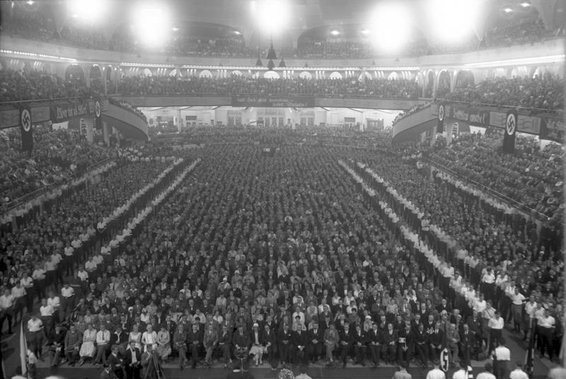 Massendemonstration der nationalsozialistischen deutschen Arbeiterpartei im Sportpalast in Berlin ! Blick in den überfüllten Sportpalast während der nationasozialistischen Wahlversammlung